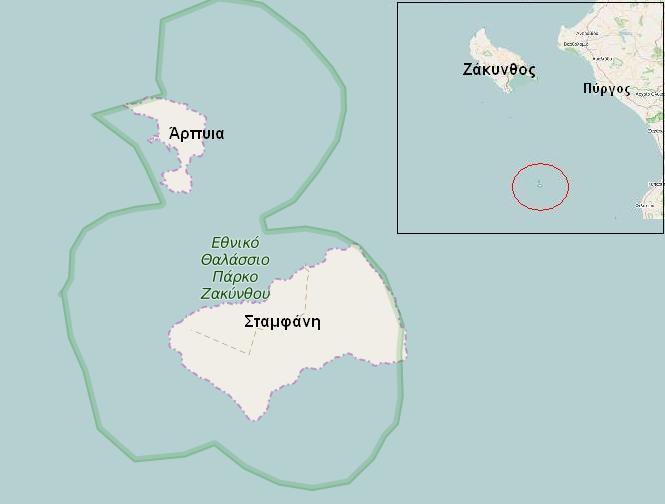 Στροφάδες